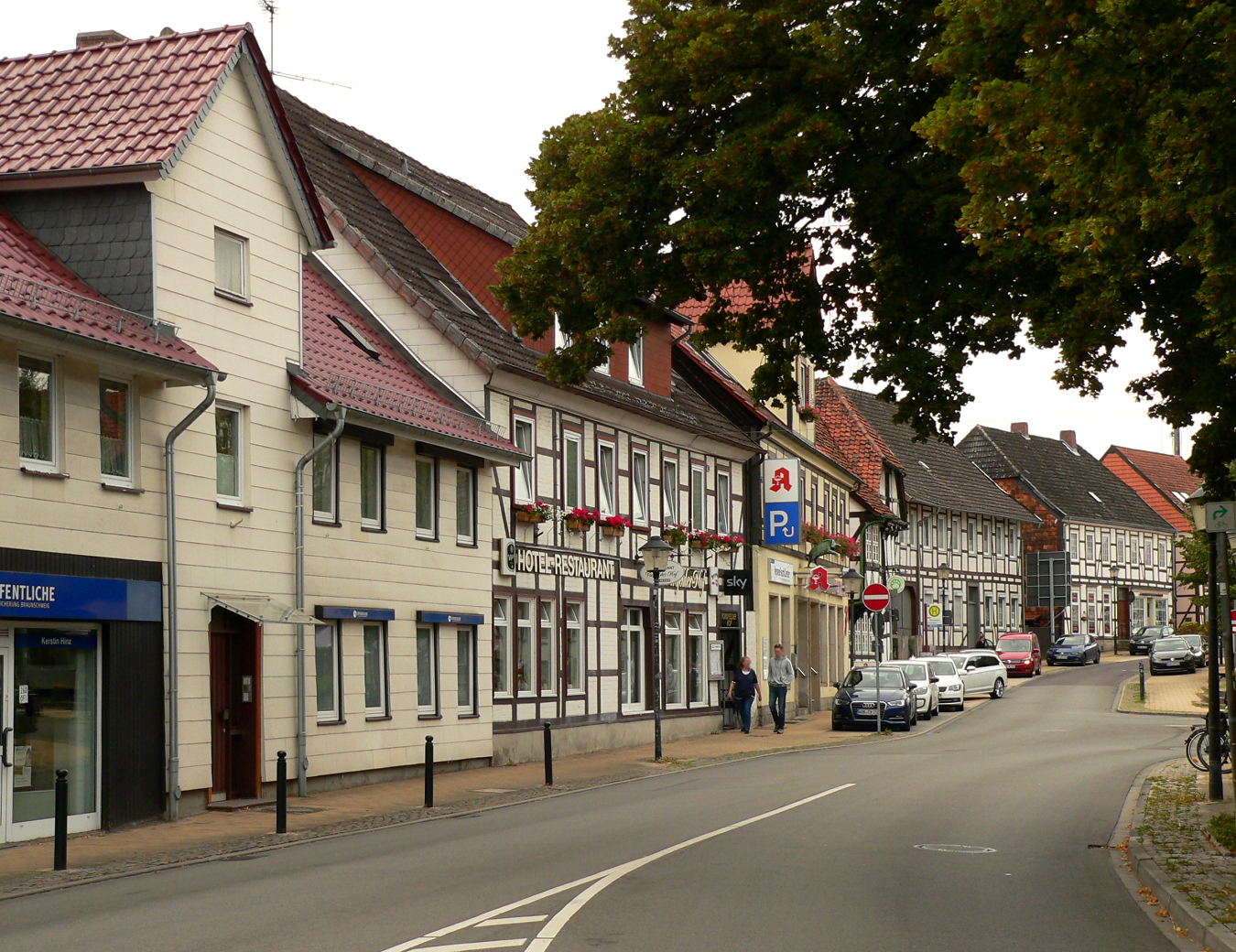 Dammtor in Vorsfelde